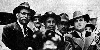 Rafael Angel Calderón Guardia, Manuel Mora Valverde y otros en un vehiculo en los años 30s